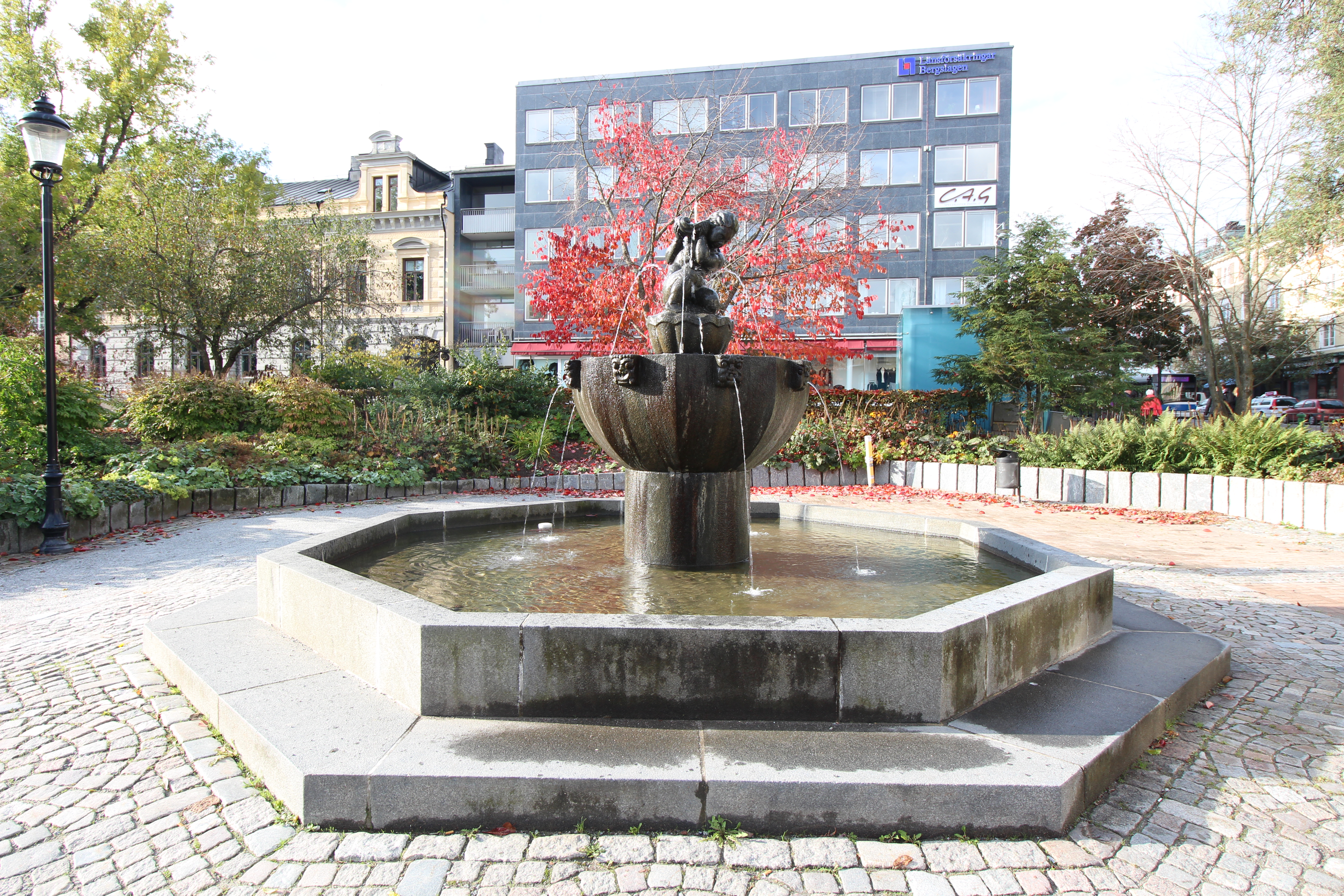 Fontän i Västerås, Vattenlek Carl Vilhelm Elmberg